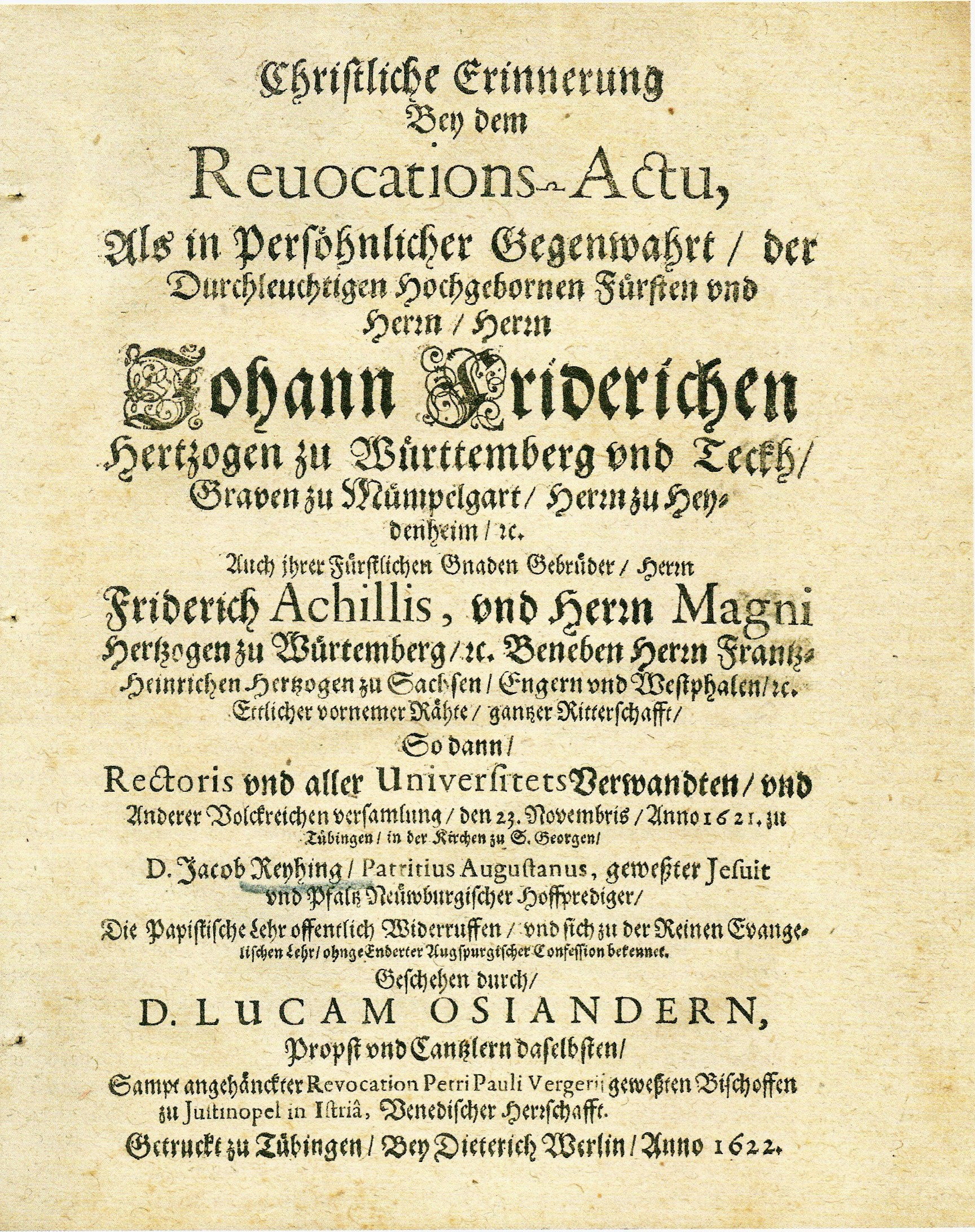 „Christliche Erinnerung Bey dem Reuocations-Actu ...“, Titelseite der Festschrift anlässlich des öffentlichen Widerrufs der ‚papistischen Lehr‘ durch Dr. Jacob Reihing am 23. November 1621 in Tübingen